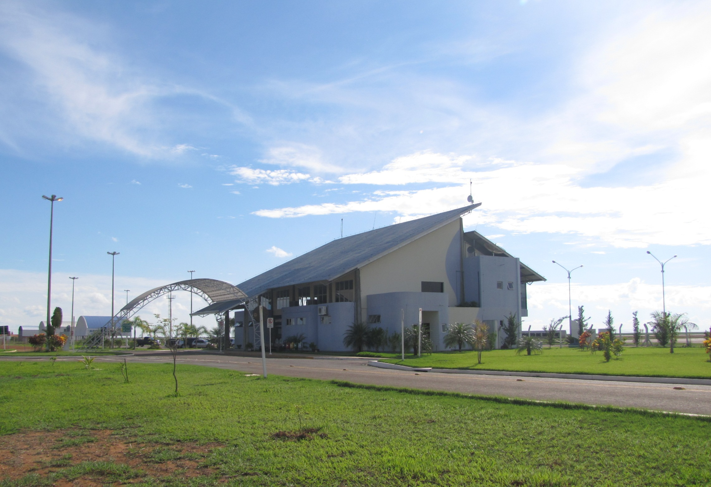 Aeroporto de Sinop, MT.